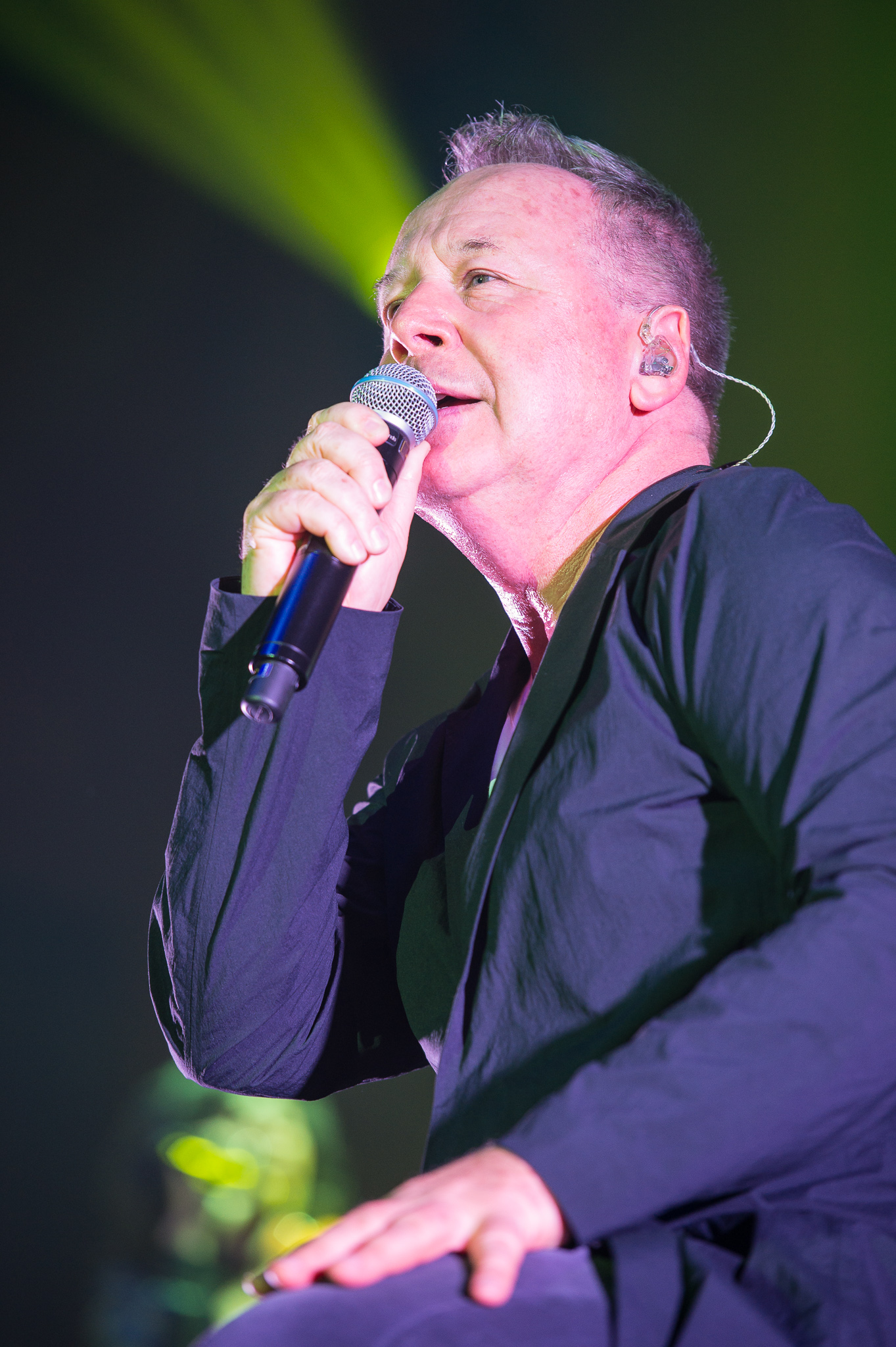 Acoustic Live Tour,Concertbüro Franken,Jim Kerr,Konzert,Livekonzert,Livemusik,Meistersingerhalle,Simple Minds